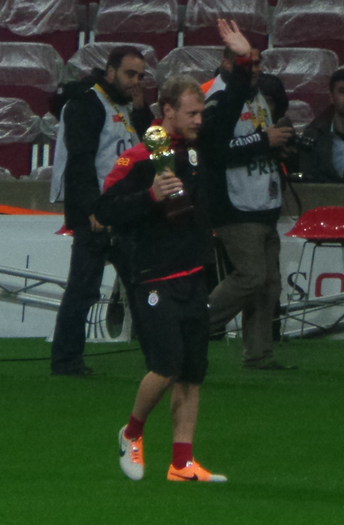 Semih ve aldığı centilmenlik ödülü